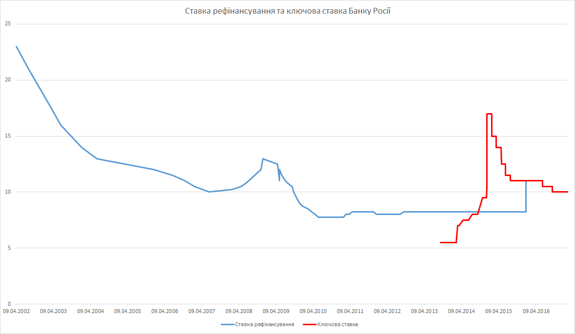 Ставка рефінансування та ключова ставка Банку Росії з 1991 р. Примітка: З 1 січня 2016 р. значення ставки рефінансування відповідає значенню ключової ставки Банку Росії на відповідну дату.